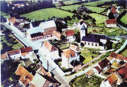 Vue aérienne du village de Willaupuis